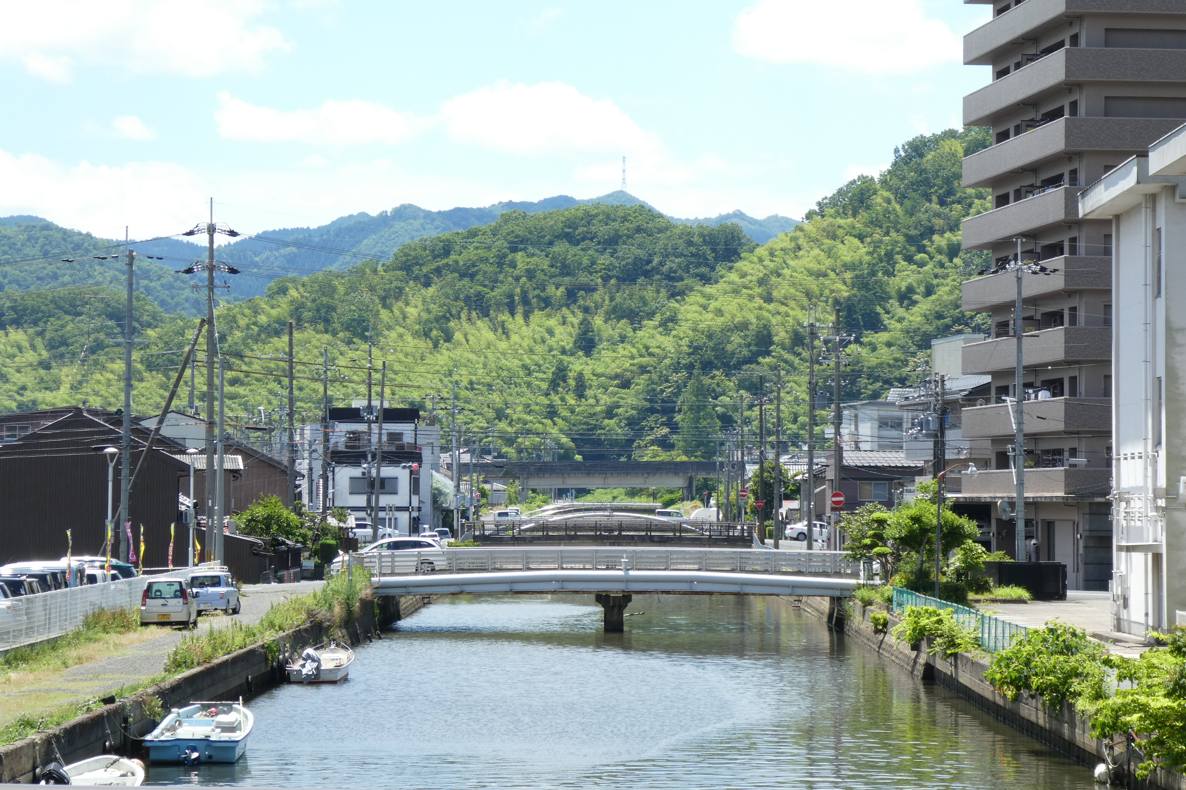 祖母谷川河口付近。京都府舞鶴市。奥の高架橋はJR小浜線。